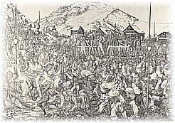 Eine alte Zeichnung zum Horn- und Klauenstreit in Rothenthurm am 6. Mai 1838